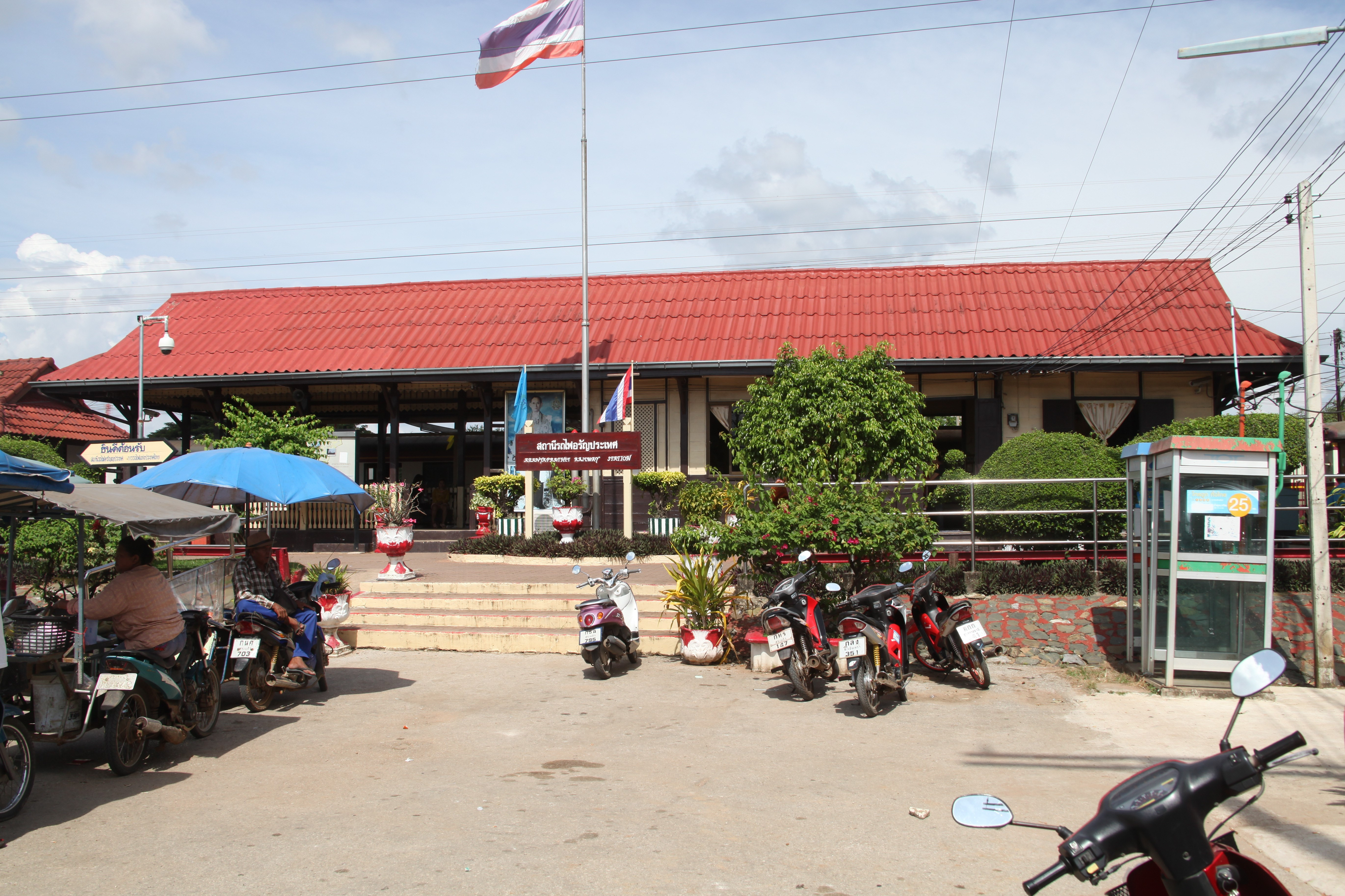 アランヤプラテート駅